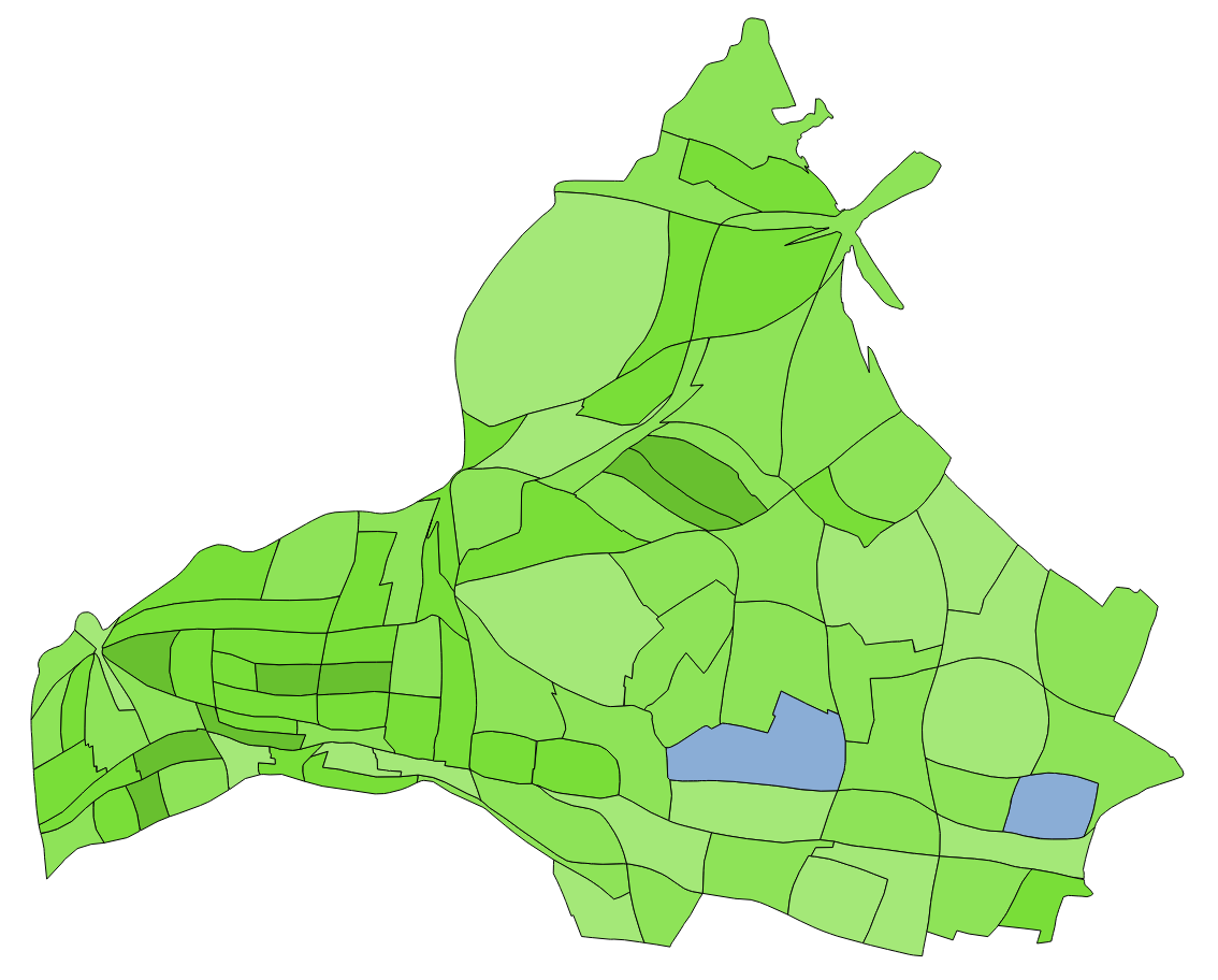 中文（台灣）: 顏色對照表